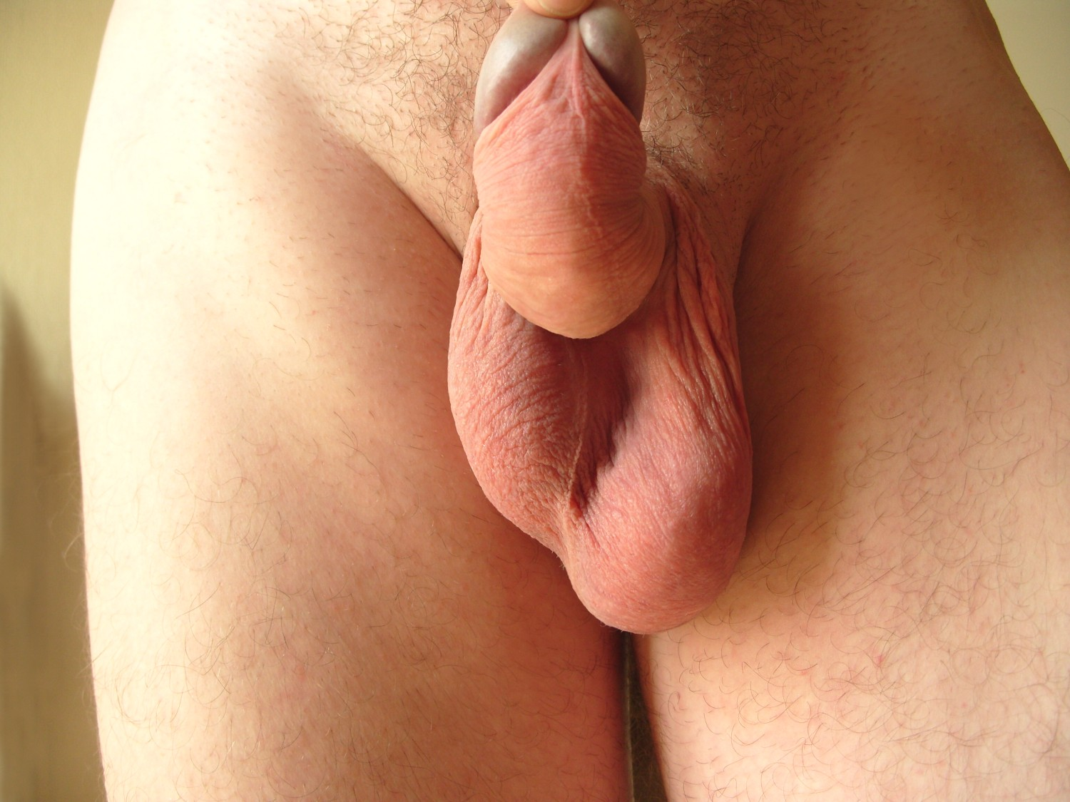 testicules